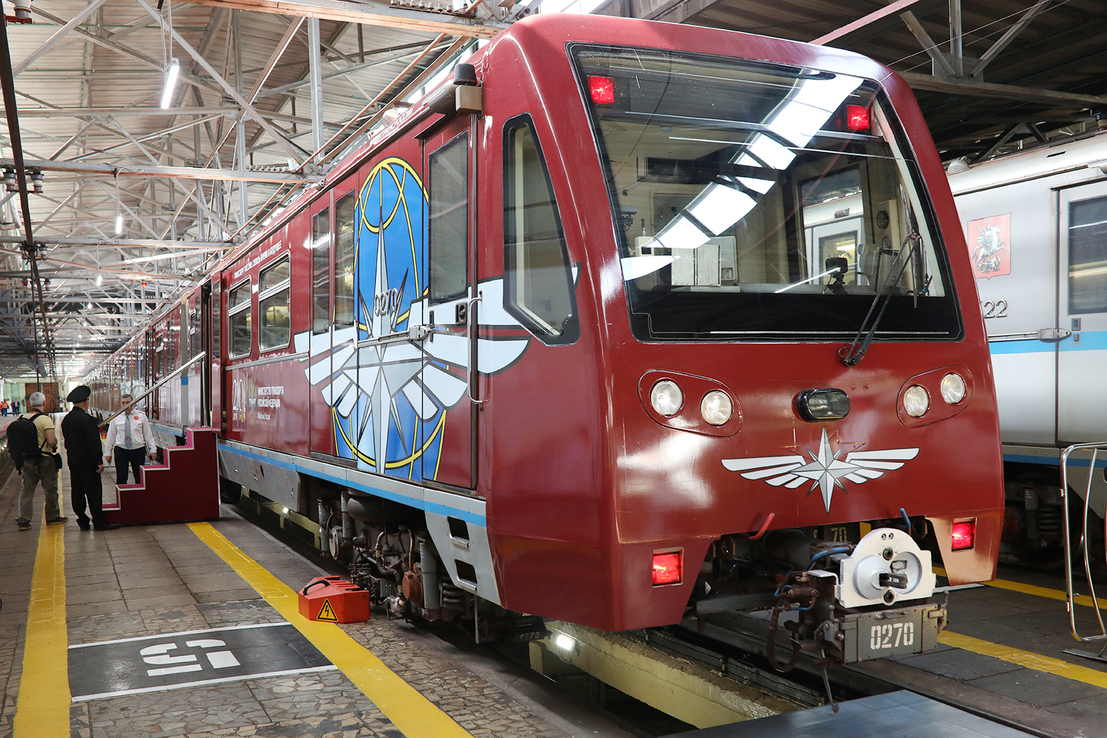 Поезд в депо